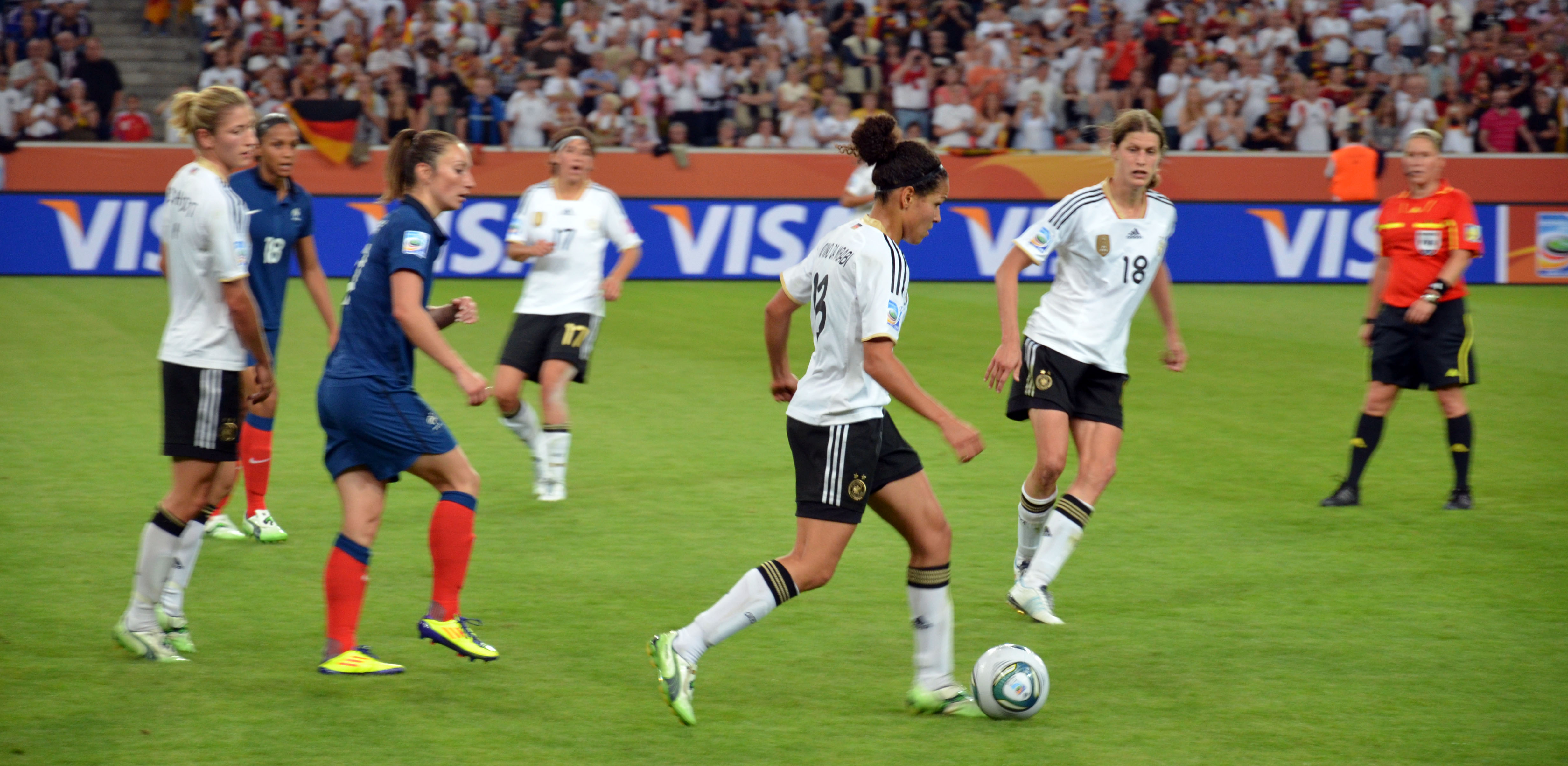 WM Vorrundenspiel zwischen Frankreich und Deutschland am 5. Juli 2011 im Borussiapark in Mönchengladbach